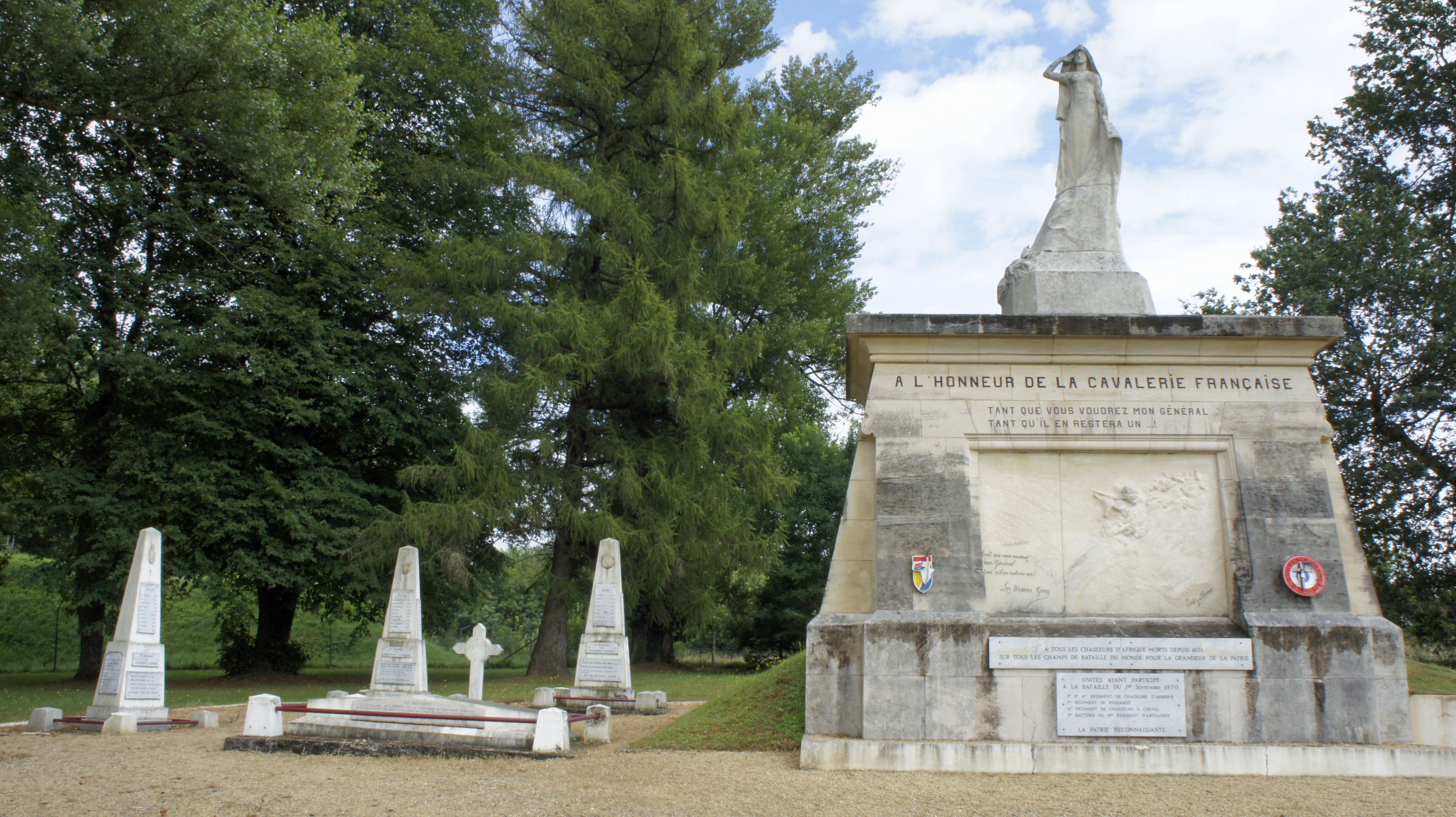 Honneur_de_la_cavalerie_française, mémorial aussi appelé Les Braves Gens erigé en 1910, Emile Guillaume architecte.